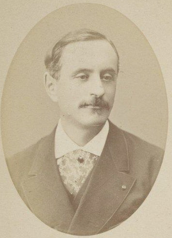 René Charles François Reille